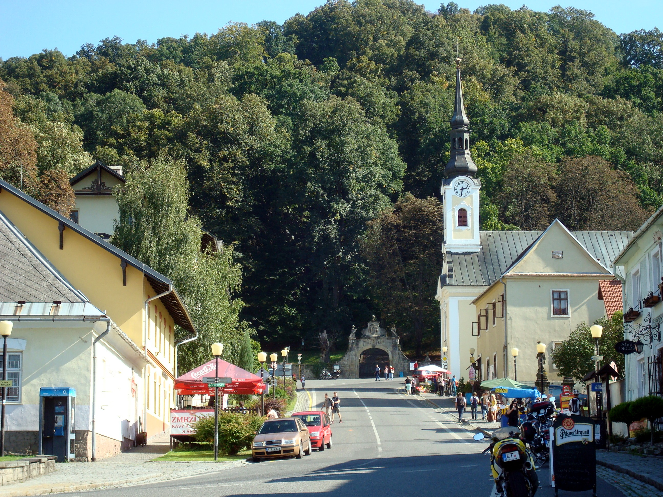 Hukvaldy, náves, vpravo kostel sv. Maxmiliána von Hamilton